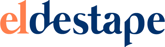 Logo del portal digital web argentino El Destape